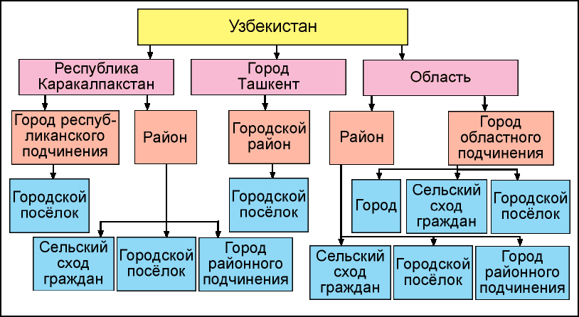 Схема АТД Узбекистана